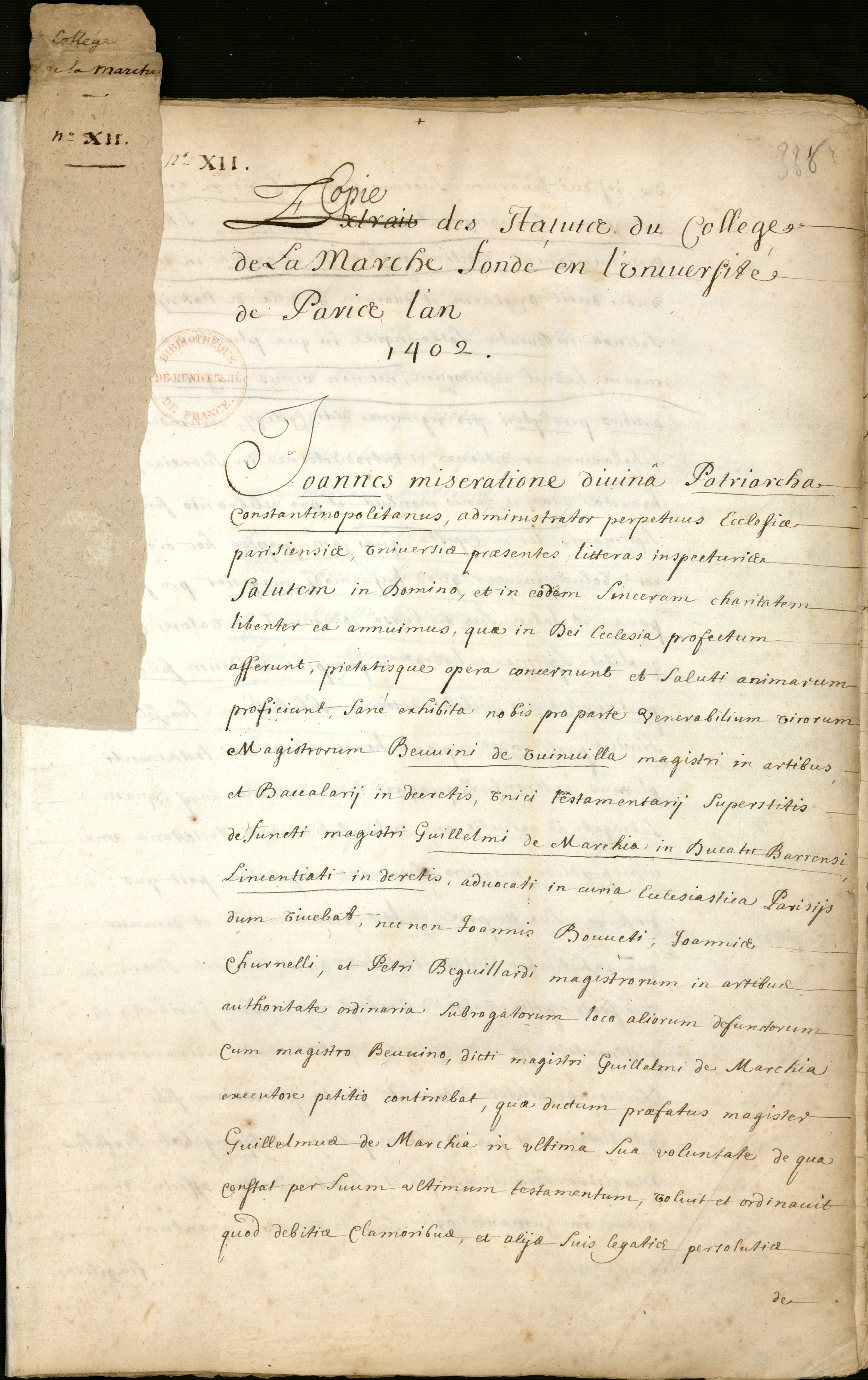 Manuscrit, dans un registre de 738 feuillets consacré aux fondations et statuts des collèges.